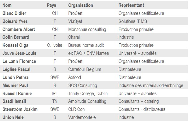 Experts Synergy 22000